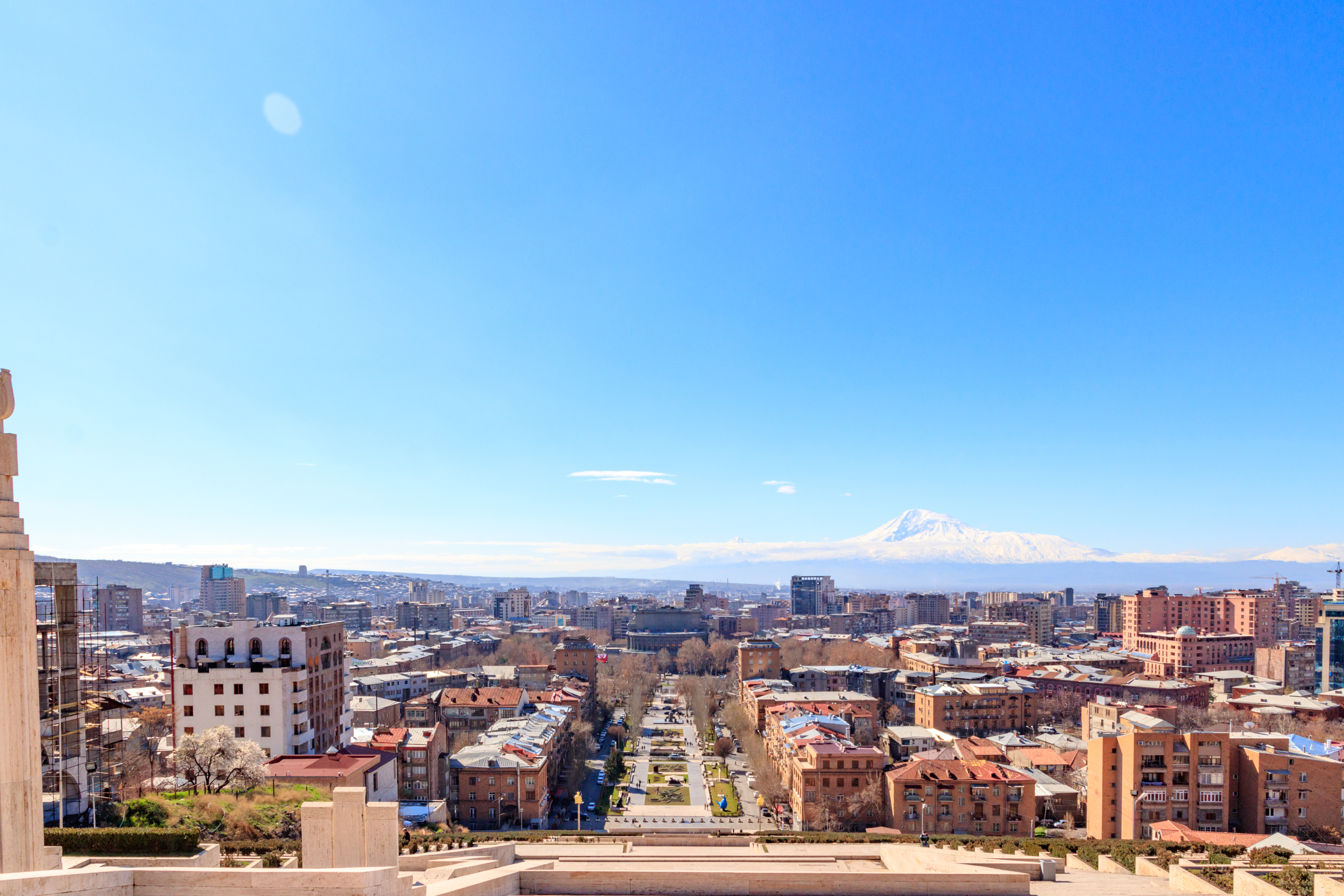 Jerewan von der Cascade of Yerevan fotografiert